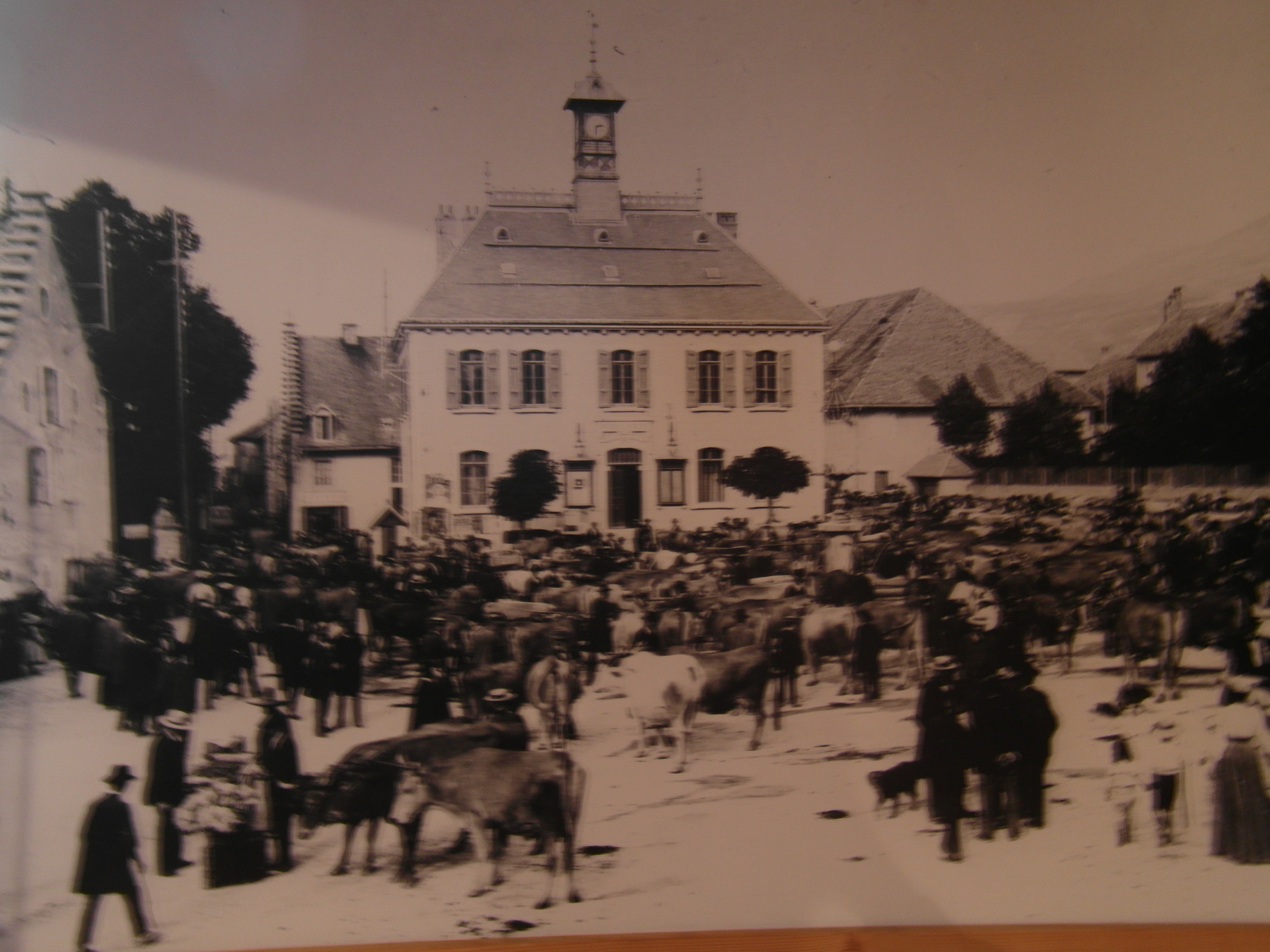 Carte postale 1900